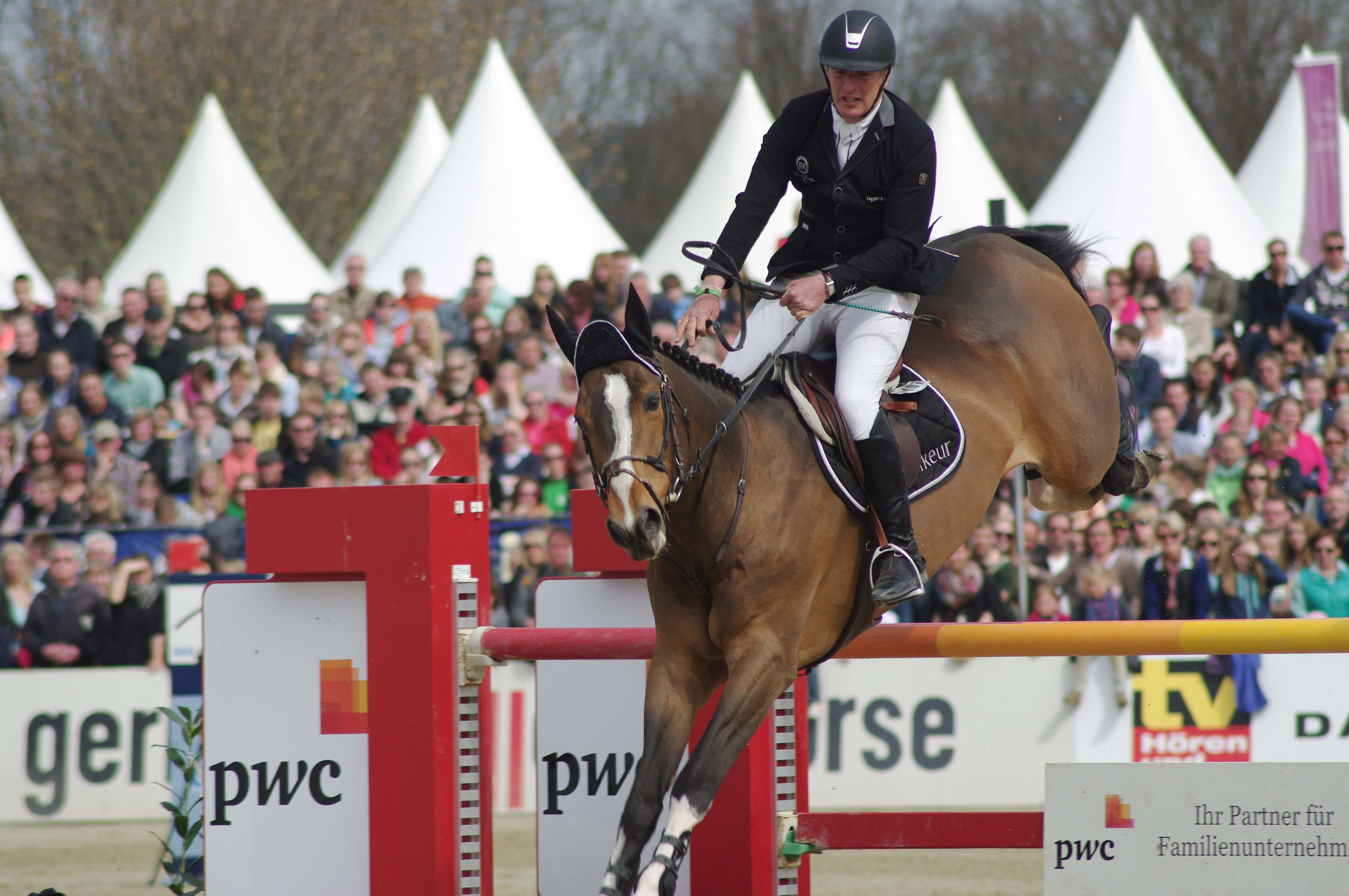 Horses & Dreams 2013: Roger-Yves Bost mit "Nippon d'Elle